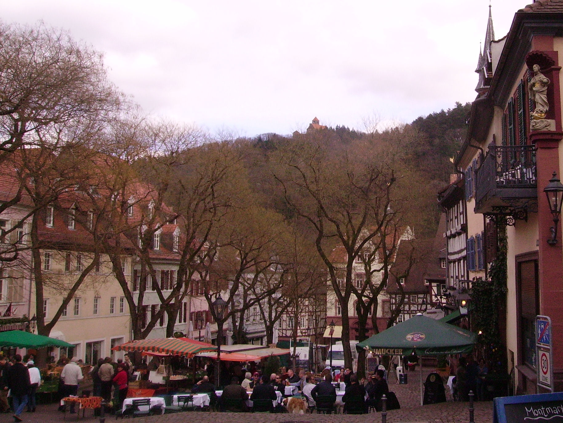 view of Weinheim, Germany